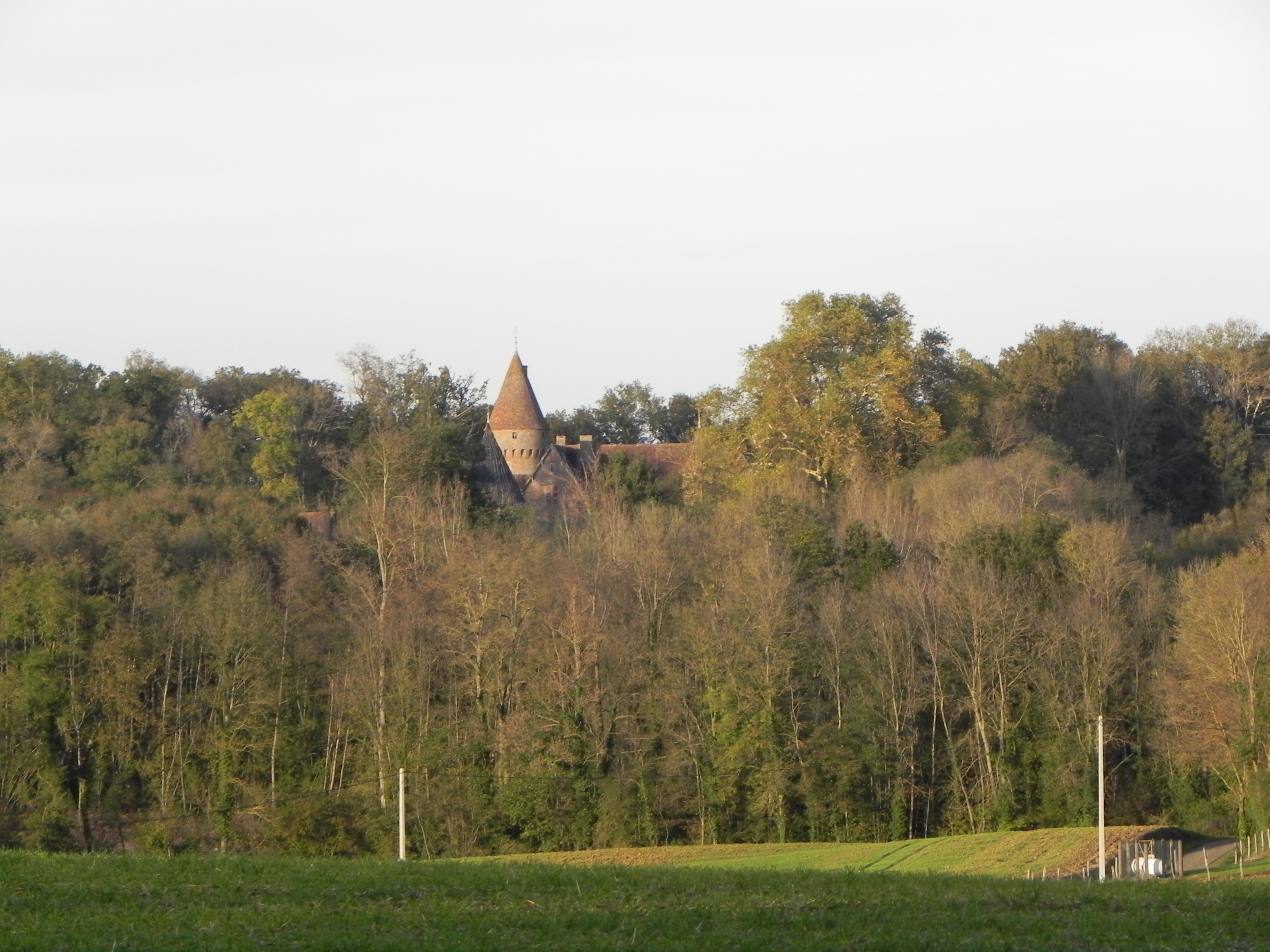 Photographie prise depuis le Hauts des Champs (Montcony) du château de Montcony. Les tours sont visibles. .